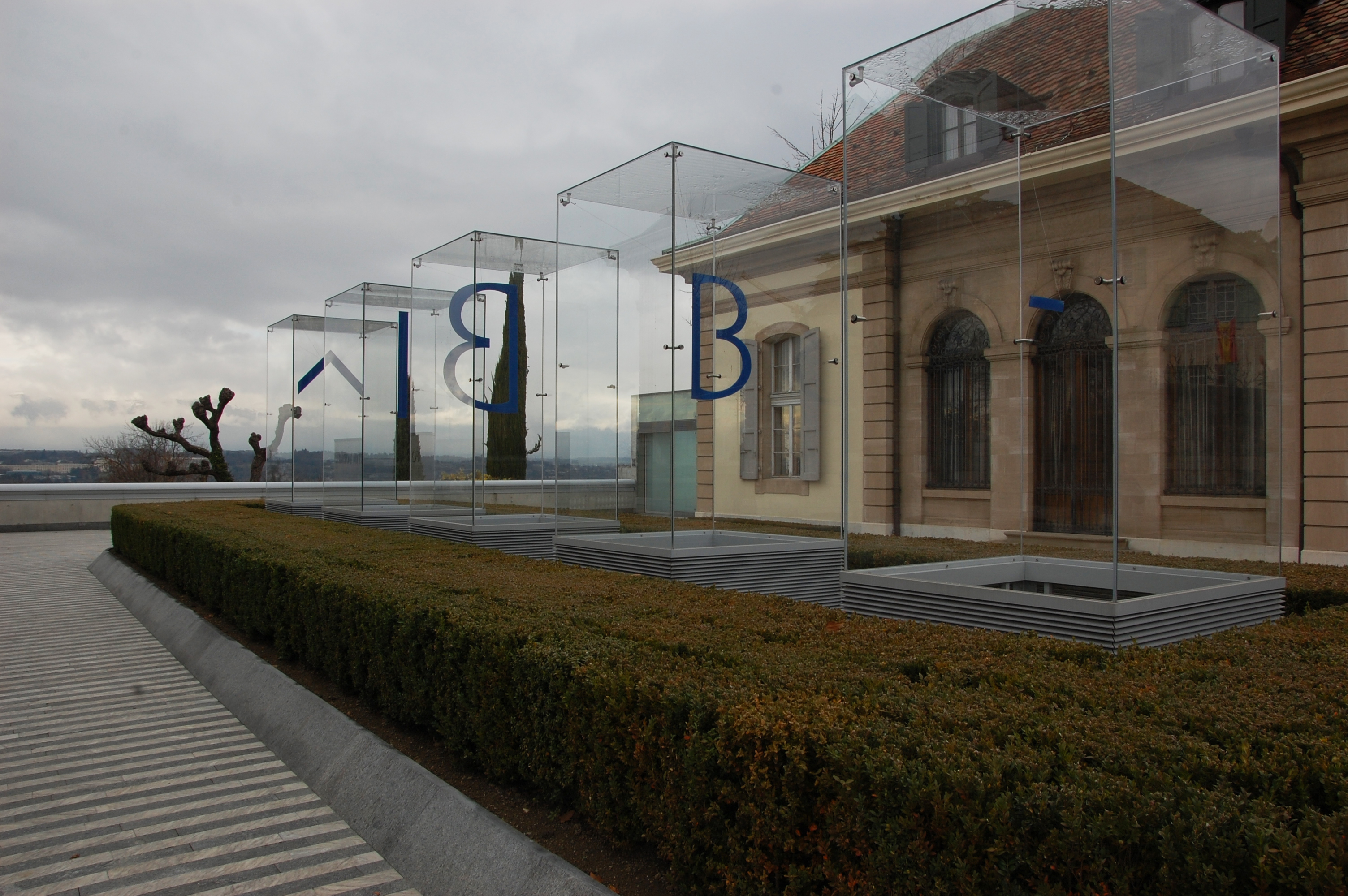 Esplanade du Musée Bodmer, Cologny